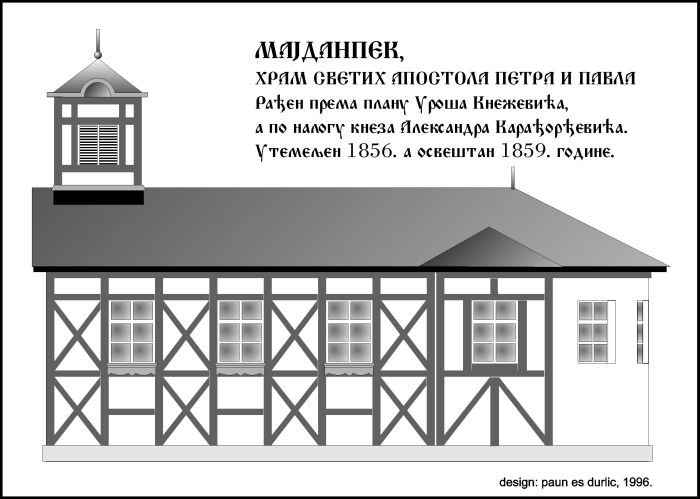 Црква у Мајданпеку, храм св. апостола Петра и Павла, подигнута 1856. године према плану сликара Уроша Кнежевића. Цртеж: Паун Ес Дурлић, 1996.